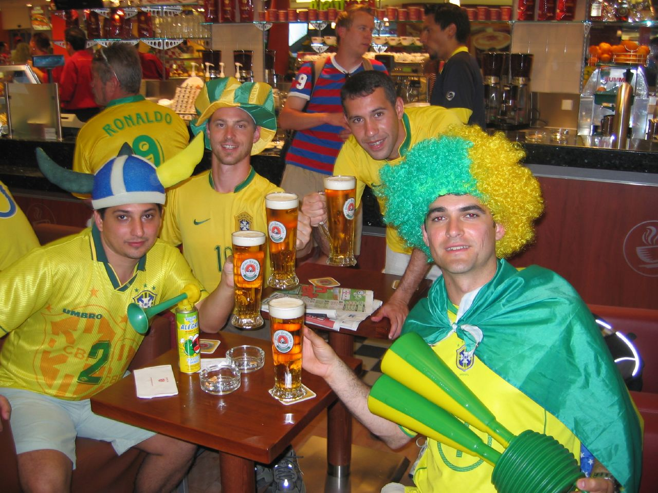 Berlin 199